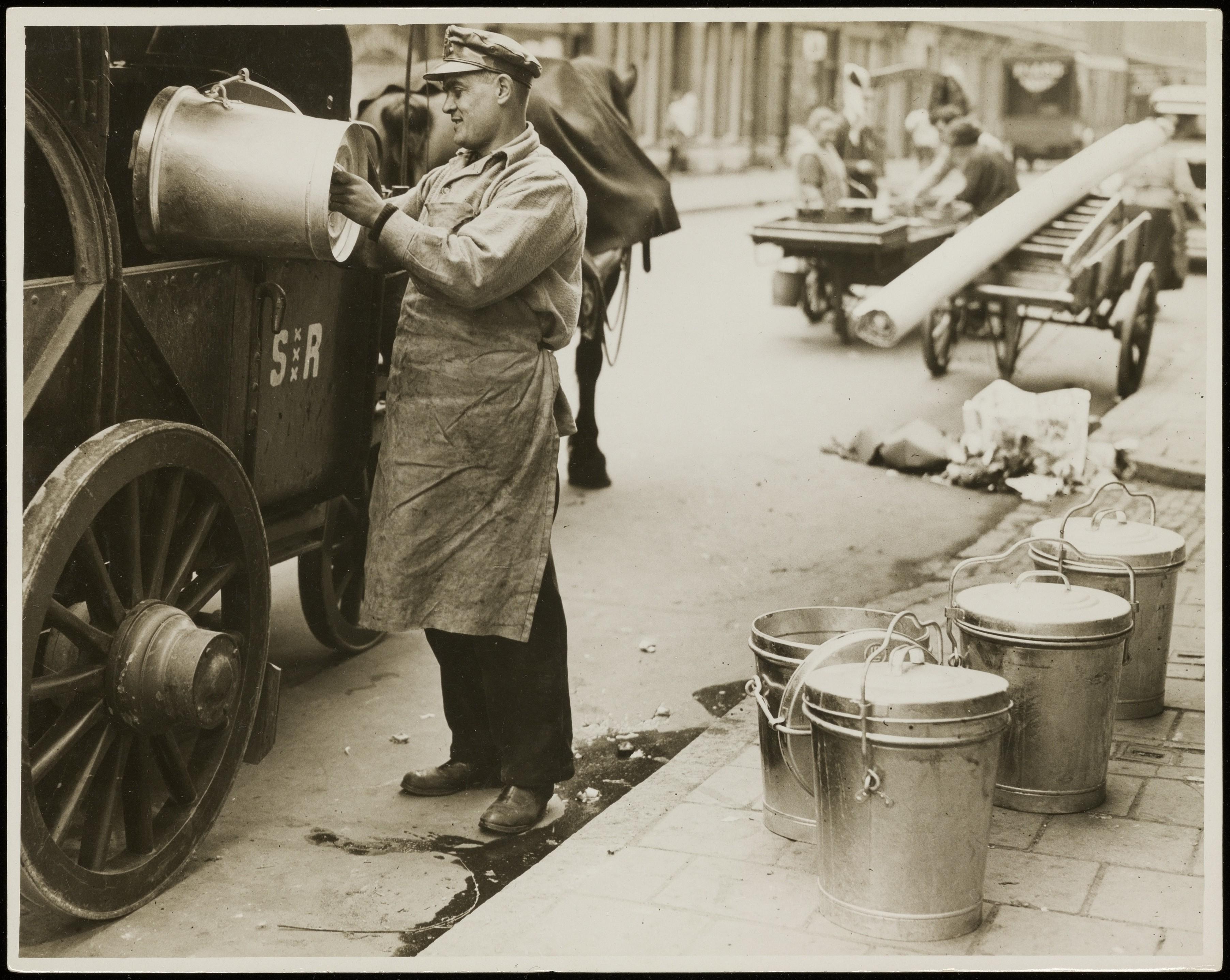 Beschrijving Een vuilnisman leegt een vuilnisemmer in een vuilniswagen Documenttype foto Vervaardiger Onbekend Anoniem Collectie Collectie Stadsarchief Amsterdam: foto-afdrukken Datering 1930 ca. Inventarissen Afbeeldingsbestand ANWR00186000001